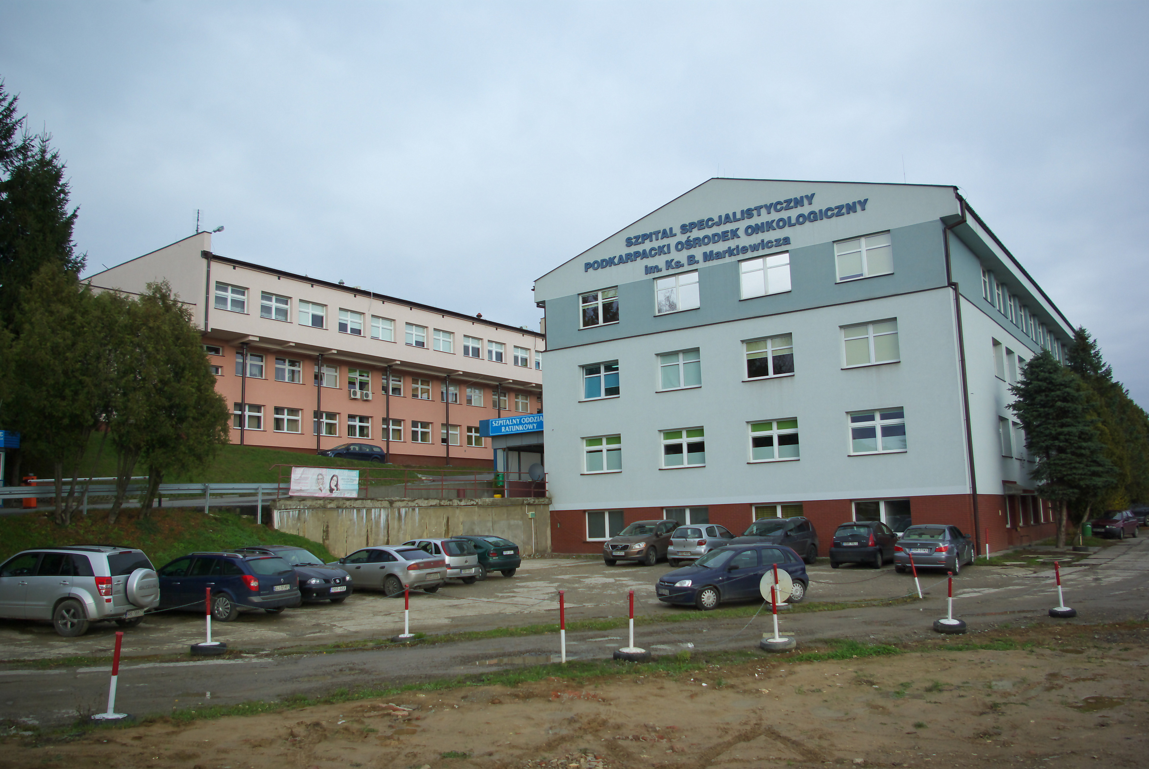 Szpital Specjalistyczny. Podkarpacki Ośrodek Onkologiczny imienia księdza Bronisława Markiewicza w Brzozowie przy ulicy Bielawskiego 18